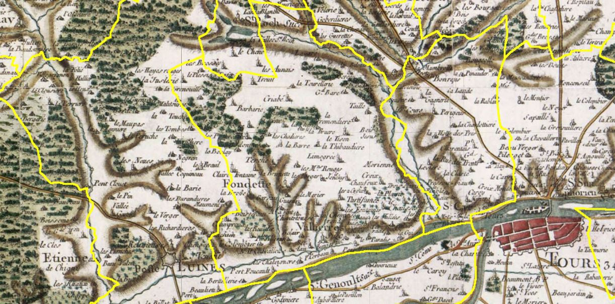 Fondettes et ses limites communales sur un extrait de la carte réalisée par César-François Cassini